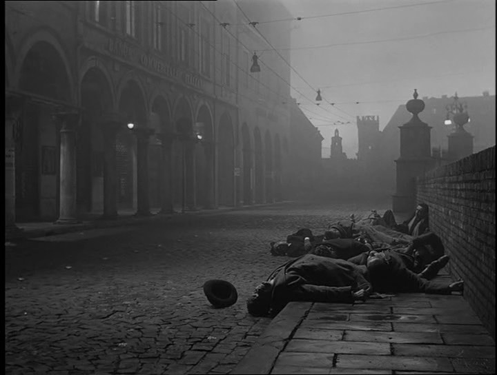 Screenshot del film La lunga notte del '43 (1960) di Florestano Vancini.